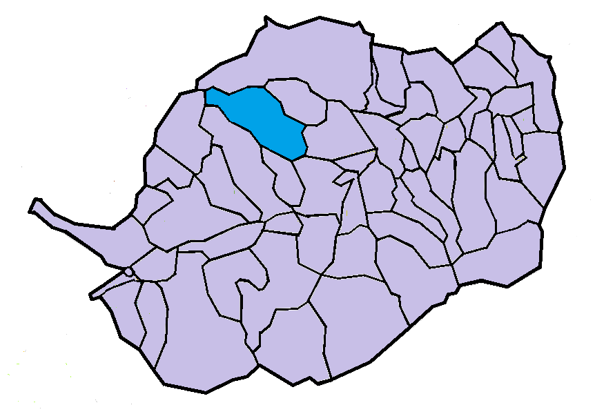 Noedes en el Conflent, a partir del mapa municipal del Conflent de lliure disposició adaptat al Nomenclàtor toponímic aprovat el 2007